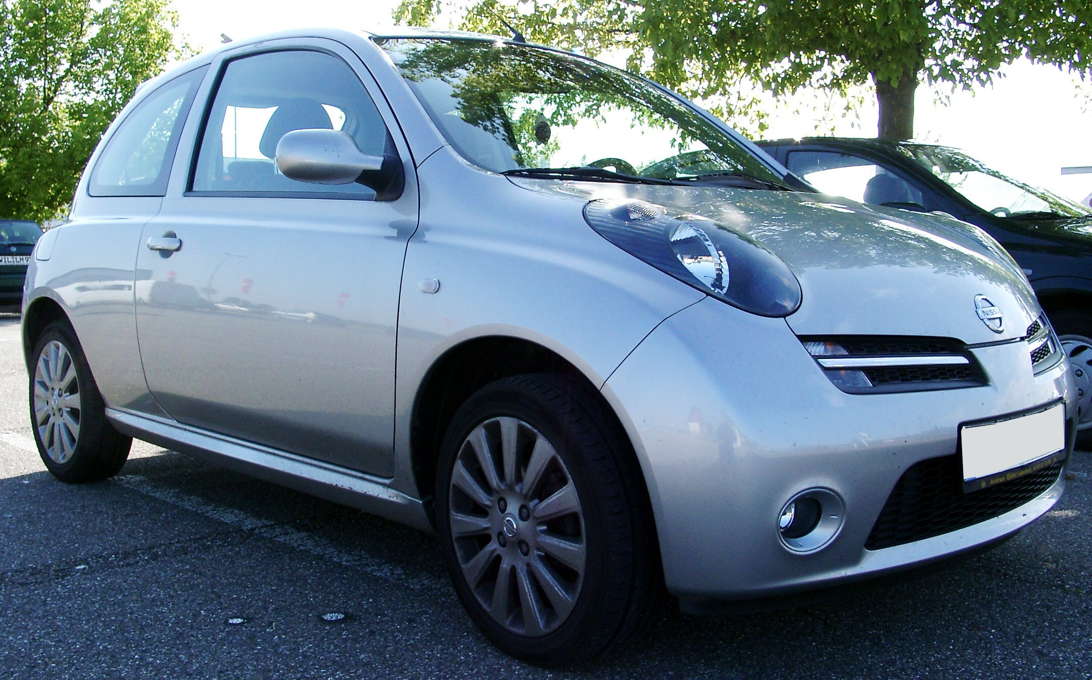 Nissan Micra, 3. Generation